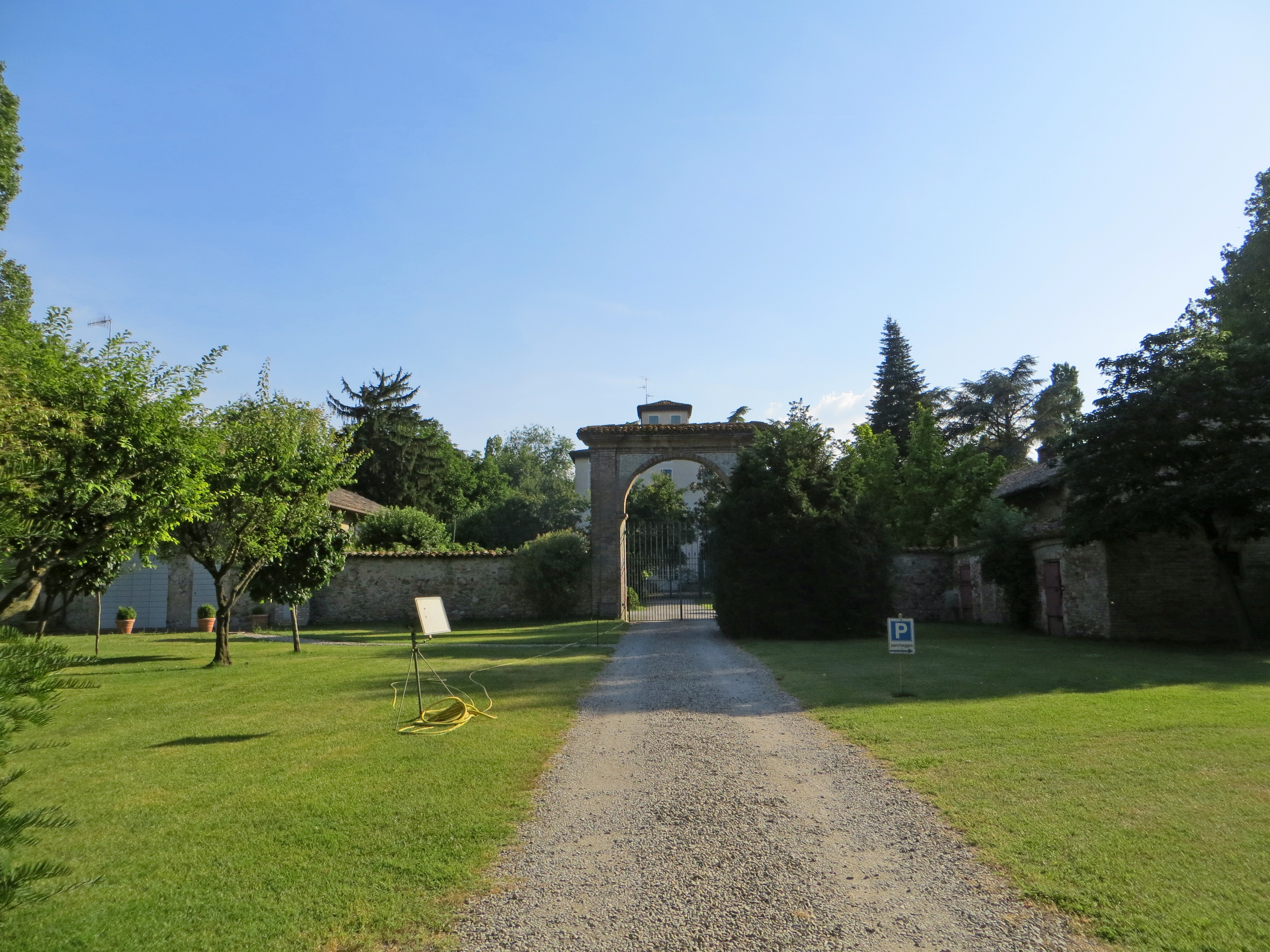 Villa Borri (Basilicagoiano, Montechiarugolo) - viale d'ingresso